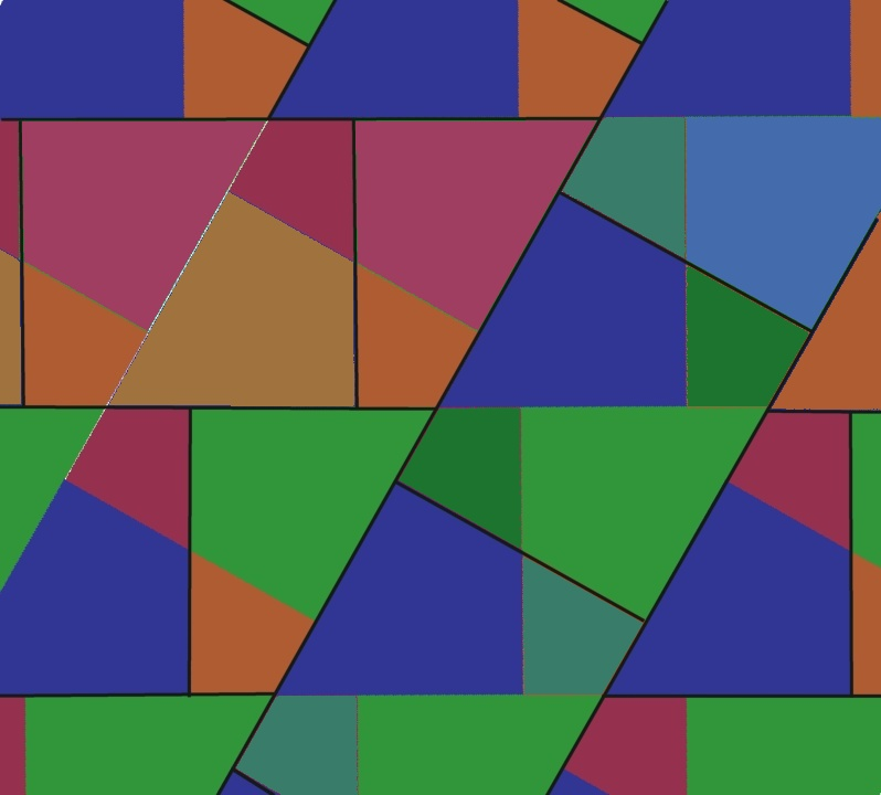 Deltoid kite tessellation tile pattern plane